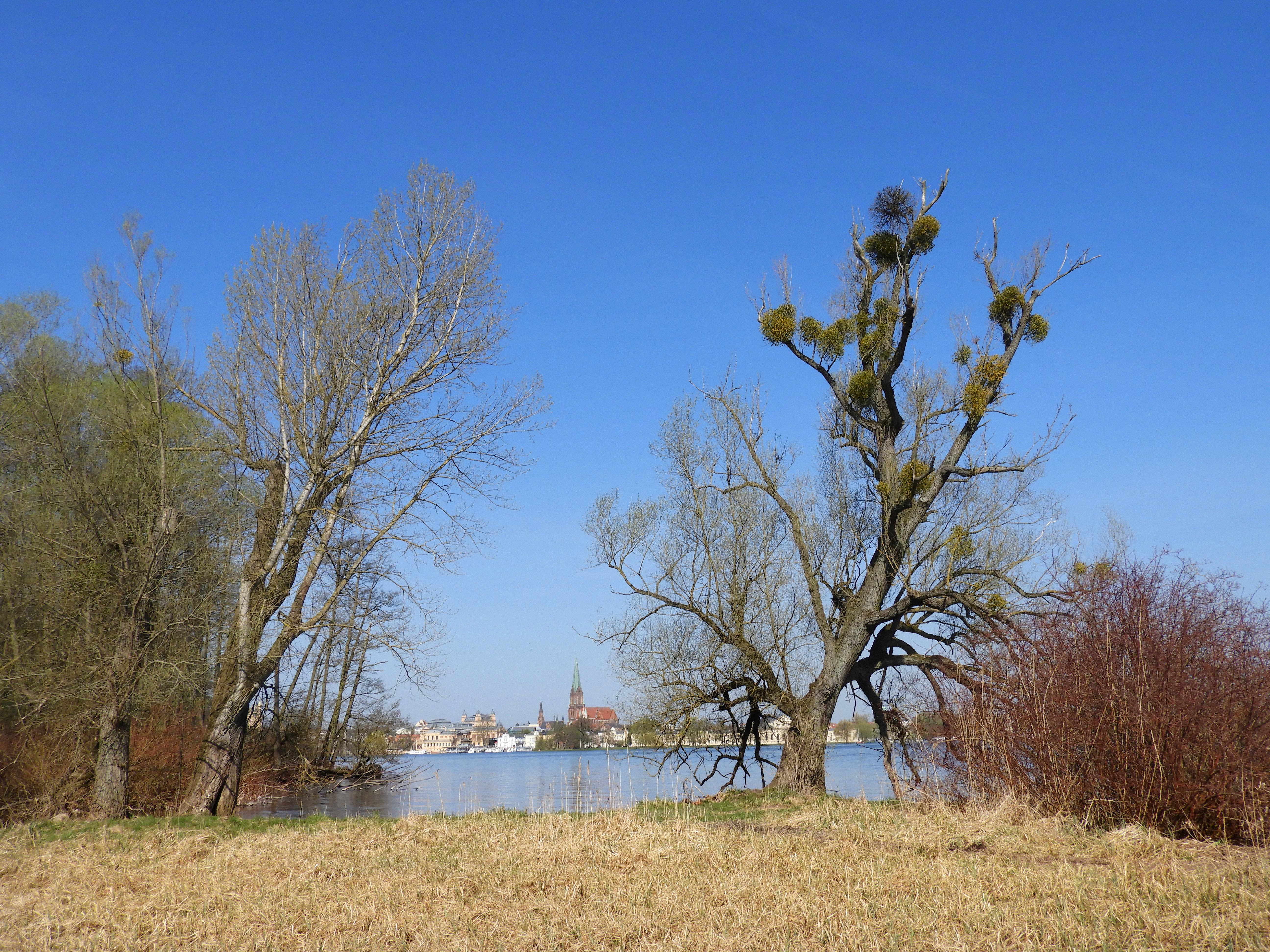 Blick aus südöstlicher Richtung über den Schweriner See auf Schwerin. Im Bereich des EU-Vogelschutzgebietes "Schweriner Seen" mit der Gebietsnummer 2235-402 sind in 2005 drei neue Landschaftsschutzgebiete ausgewiesen worden. Das Landschaftsschutzgebiet "Schweriner Innensee und Ziegelaußensee" mit dem CDDA-Code 345196 ist eines davon. Es umfasst eine Fläche von etwa 4 430 Hektar und erstreckt sich über den Schweriner Innensee, den Ziegelaußensee, den Medeweger See, den Schelfwerder, das Wickendorfer Moor, die Lewitz und auch über Teile der nördlich des Zentrums der Stadt liegenden landwirtschaftlichen Flächen. Der Schutzzweck ist hier die Erhaltung und die Verbesserung der Bedingungen, die es den Vogelarten ermöglichen, das Gebiet zu nutzen.